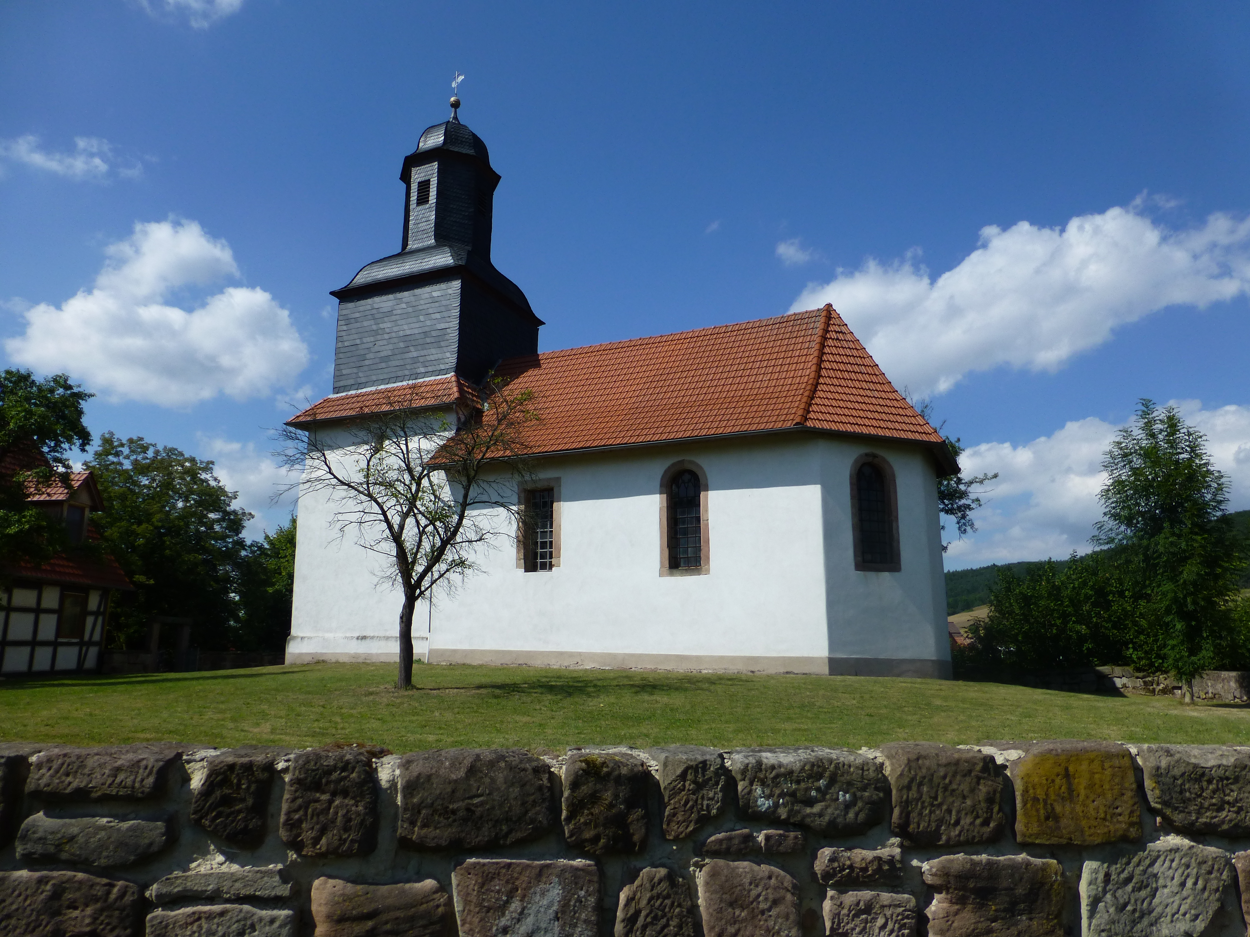 Die evangelische Kirche in Fretterode